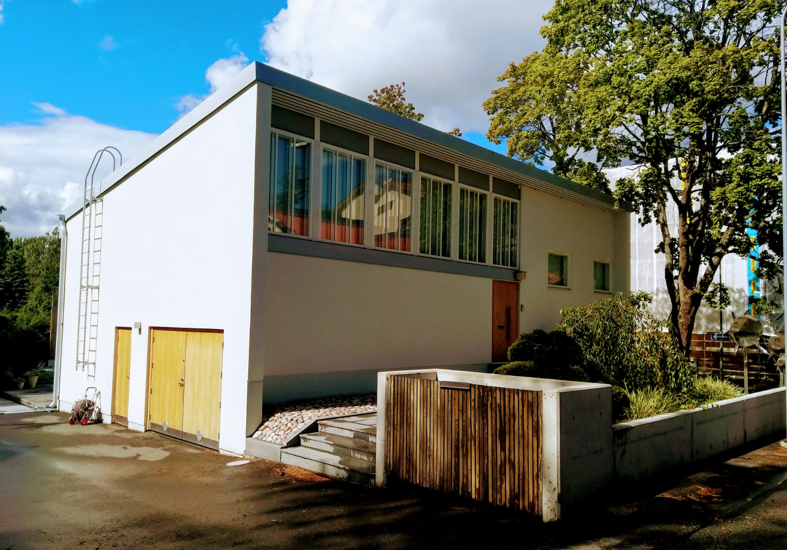 Eila Hiltusen ateljee Munkkiniemessä, Helsingissä